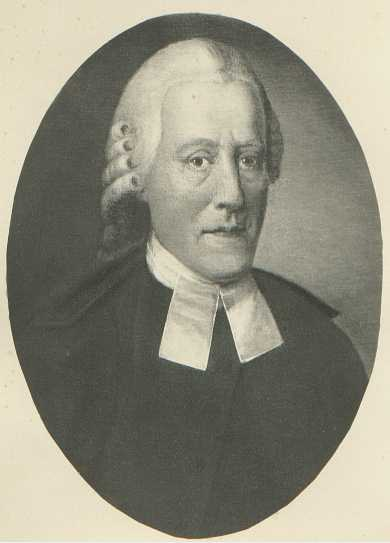 Der norddeutsche evangelische Theologe Bernhard Friedrich Quistorp (1718-1788)